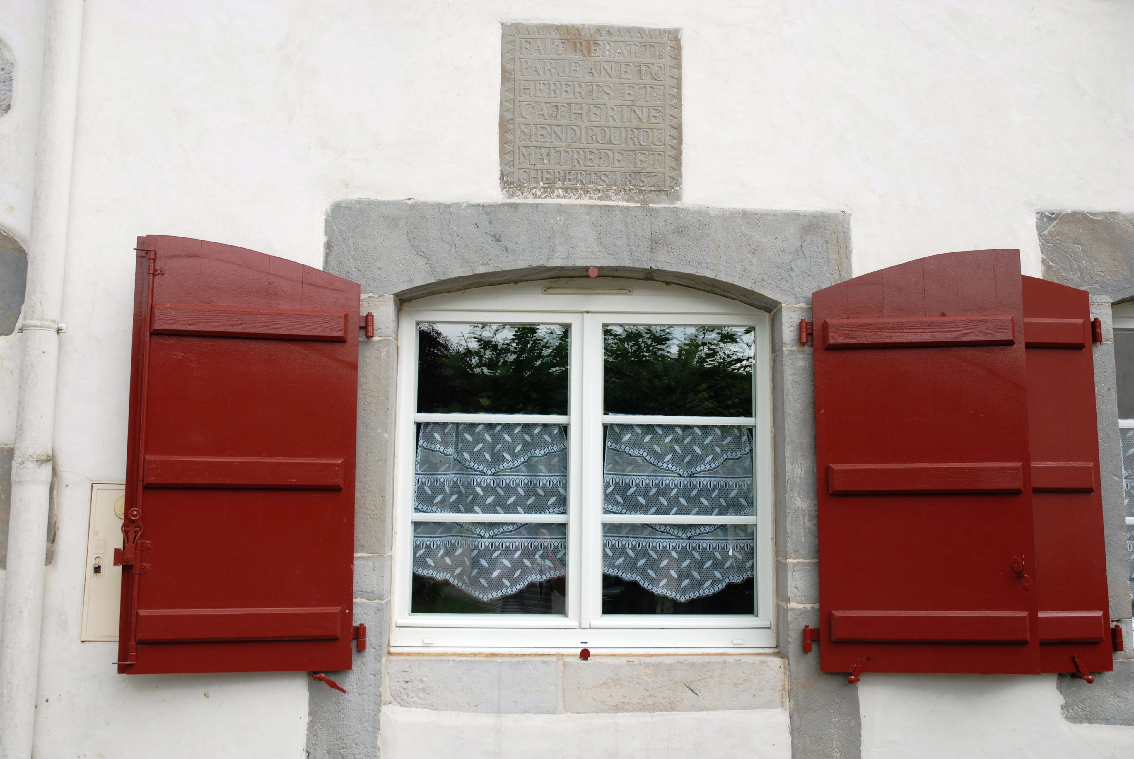 Fenêtre au linteau de 1857 à Ainhice-Mongelos